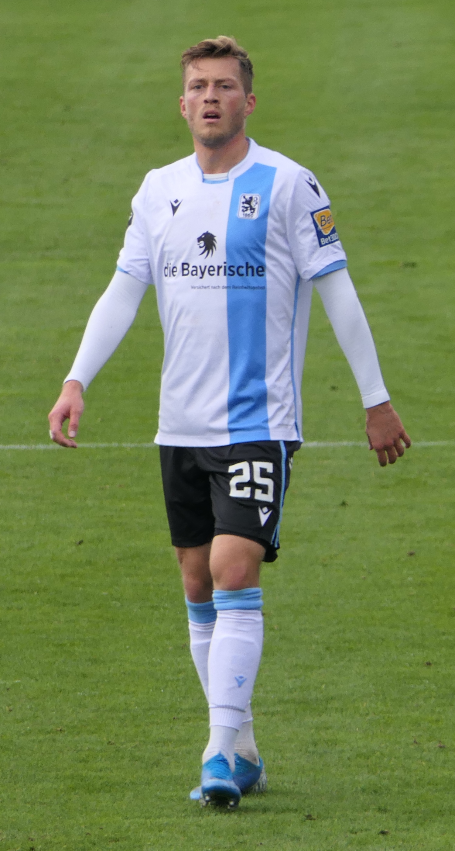 Der Fussballprofi Marius Willsch im Trikot vom TSV 1860 München beim Heimspiel gegen Eintracht Braunschweig am 26.01.2020.